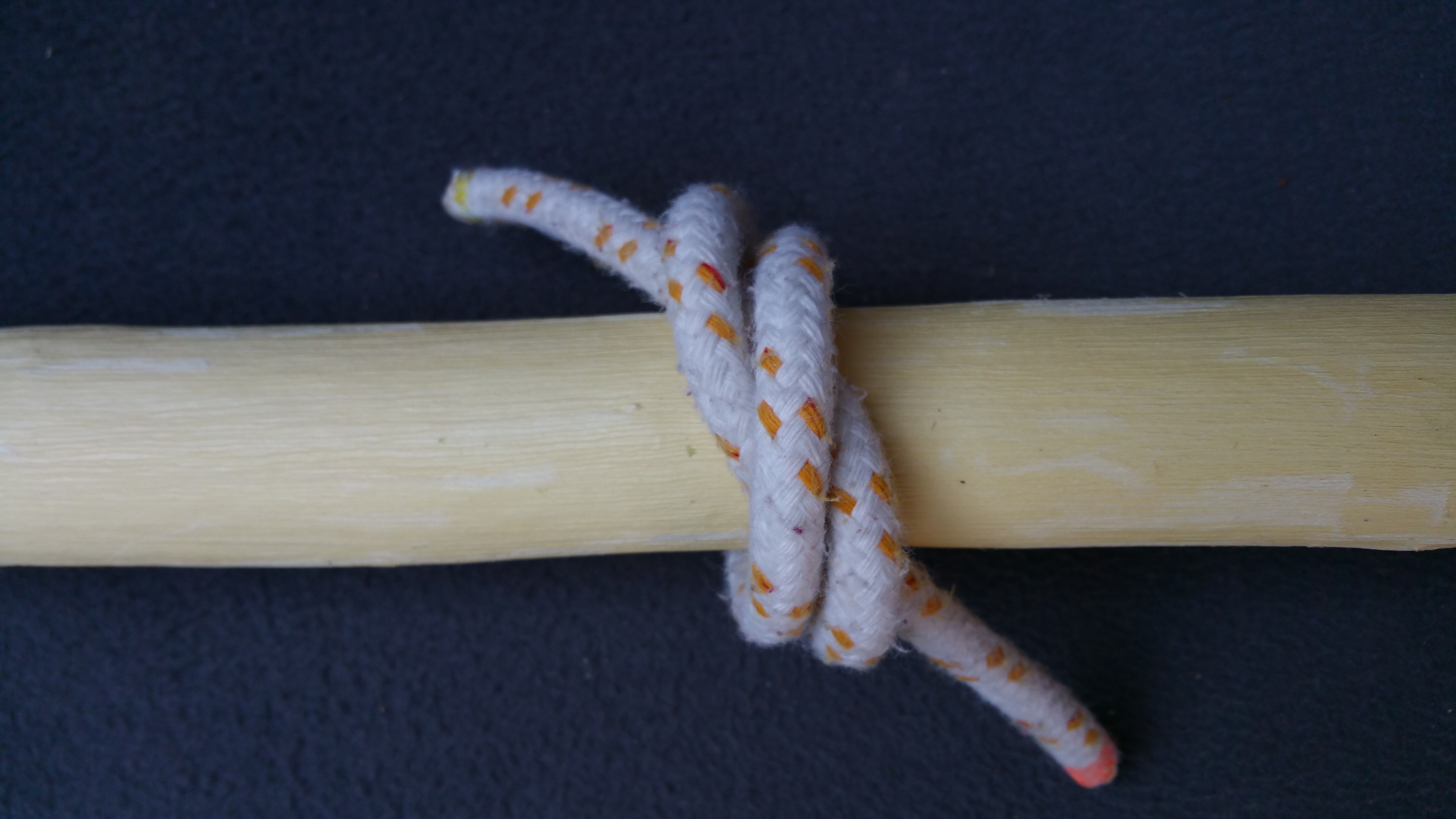 Würgeknoten